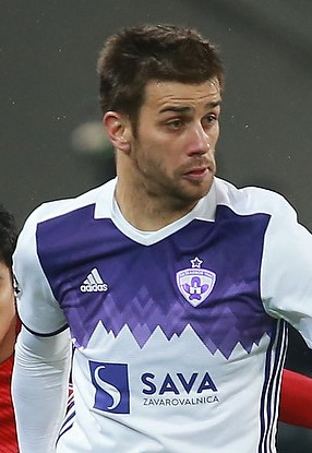 Mitja Viler, Damjan Bohar